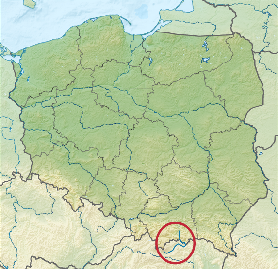 תוואי נהר פופרד. מקור: File:Relief Map of Poland.svg